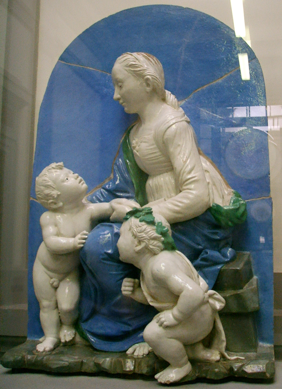 BNCF,_Girolamo_della_robbia,_madonna Biblioteca Nazionale Centrale di Firenze